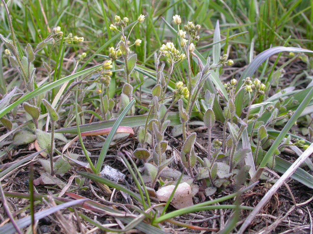 Draba nemorosa